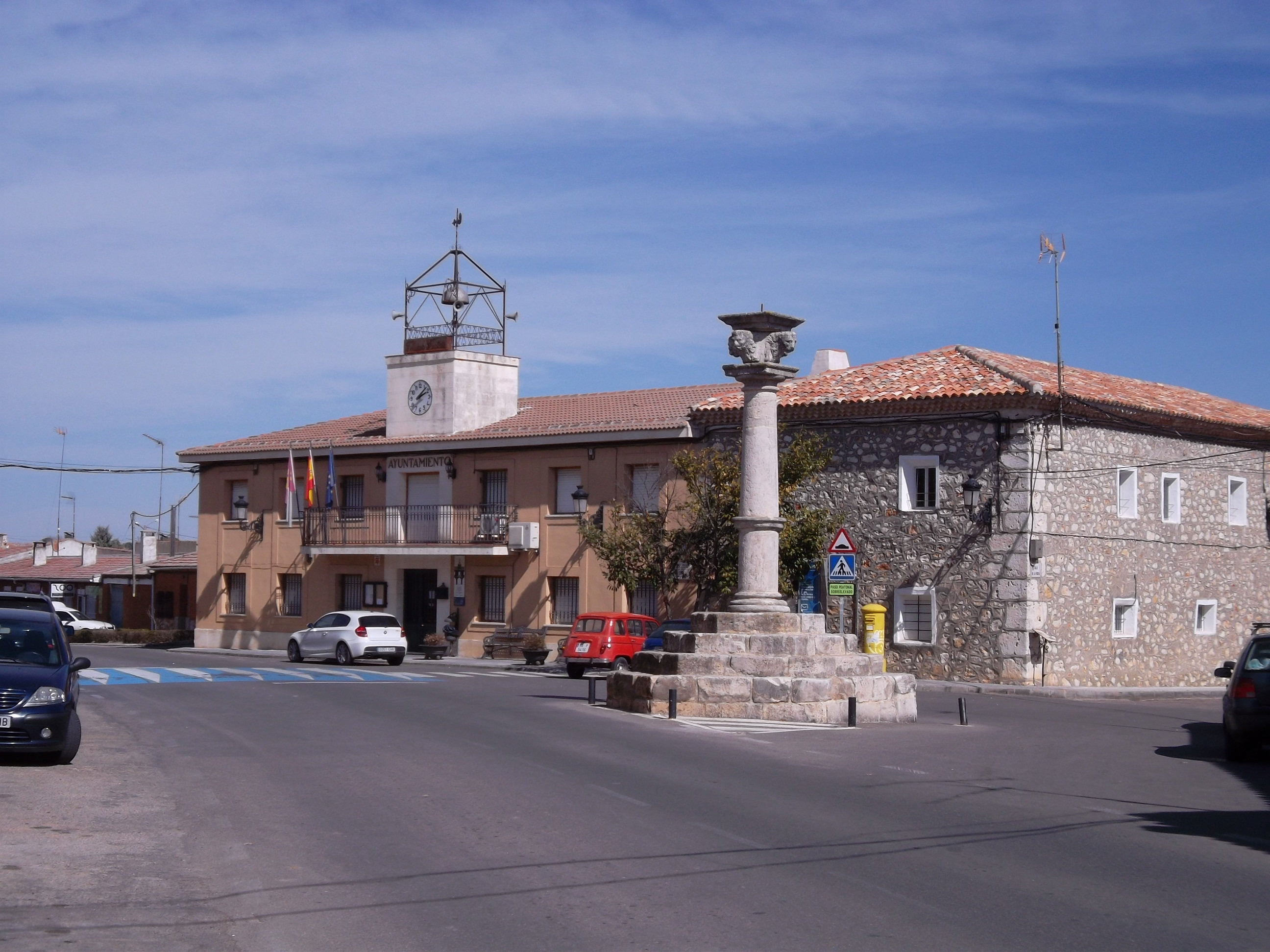 Pozo de Guadalajara-Picota y Ayuntamiento, centro de la villa.